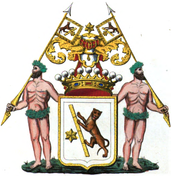 Armoiries de la famille de Spirlet